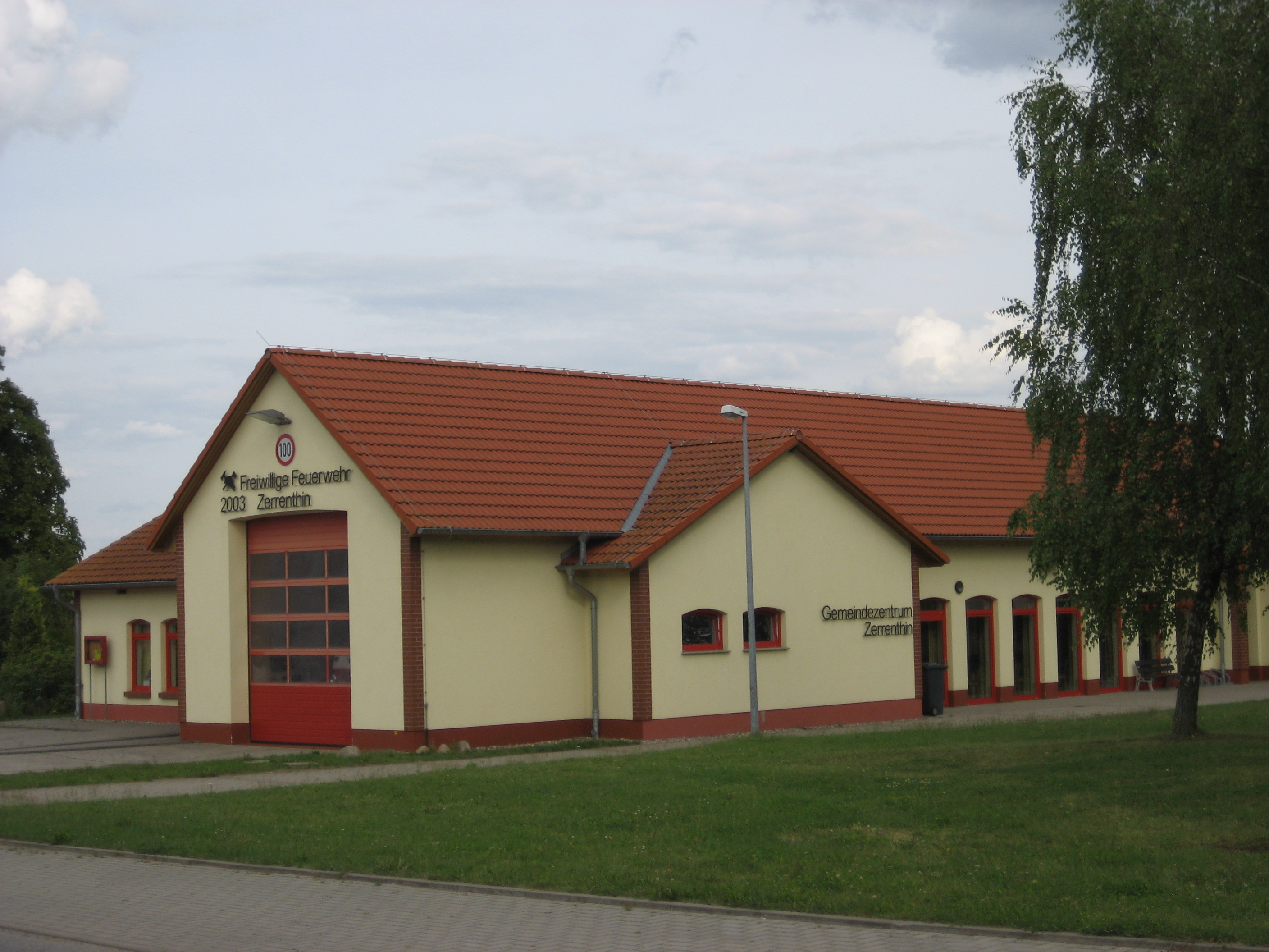 Kombiniertes Gemeindezentrum von Zerrenthin von 2003 mit großen Räumen für Feiern, Feste und Versammlungen/Veranstaltungen sowie mit den Räumlichkeiten der Freiwilligen Feuerwehr Zerrenthin aus Blickrichtung Südwesten.